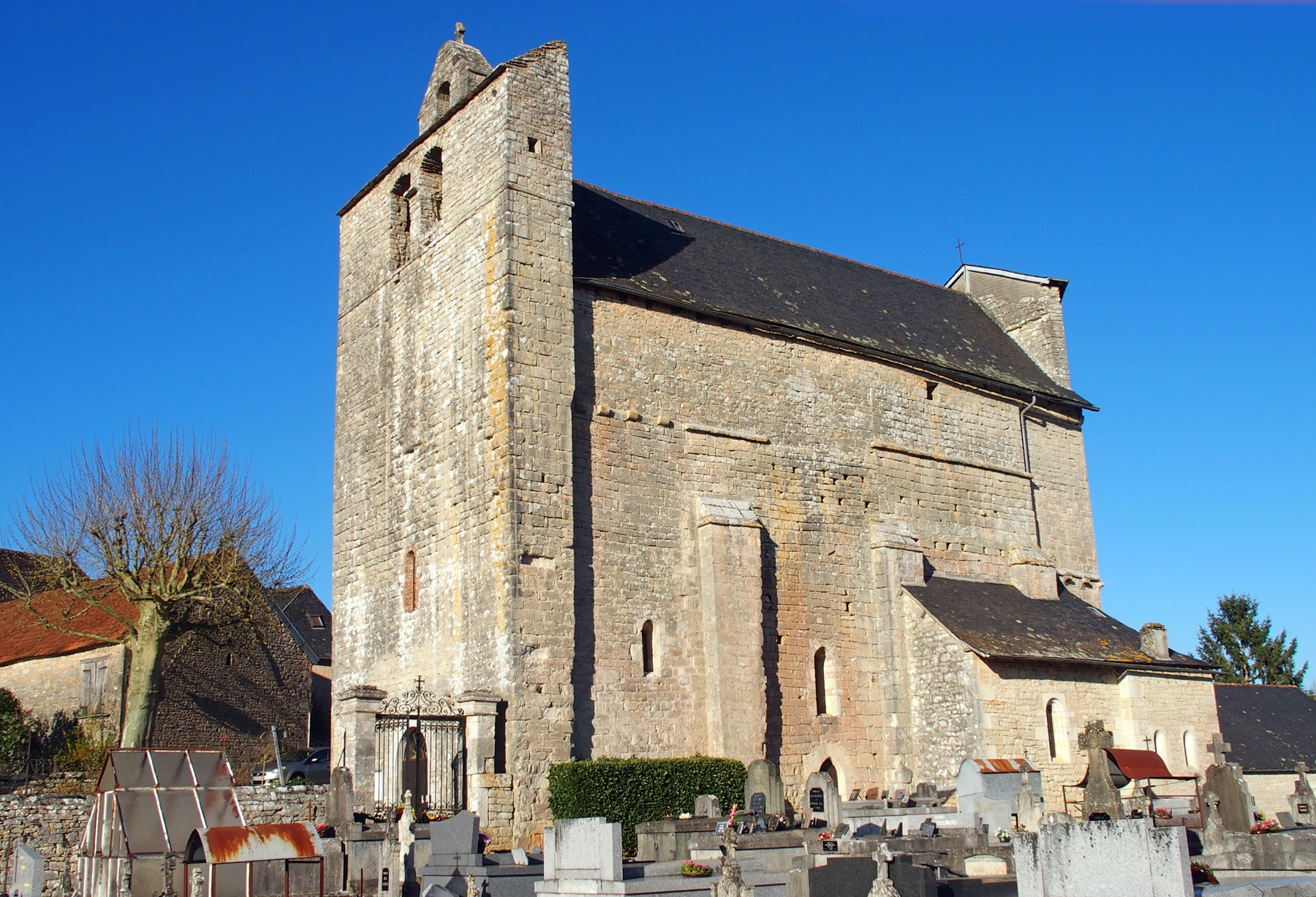 Église Saint-Julien de Nespouls